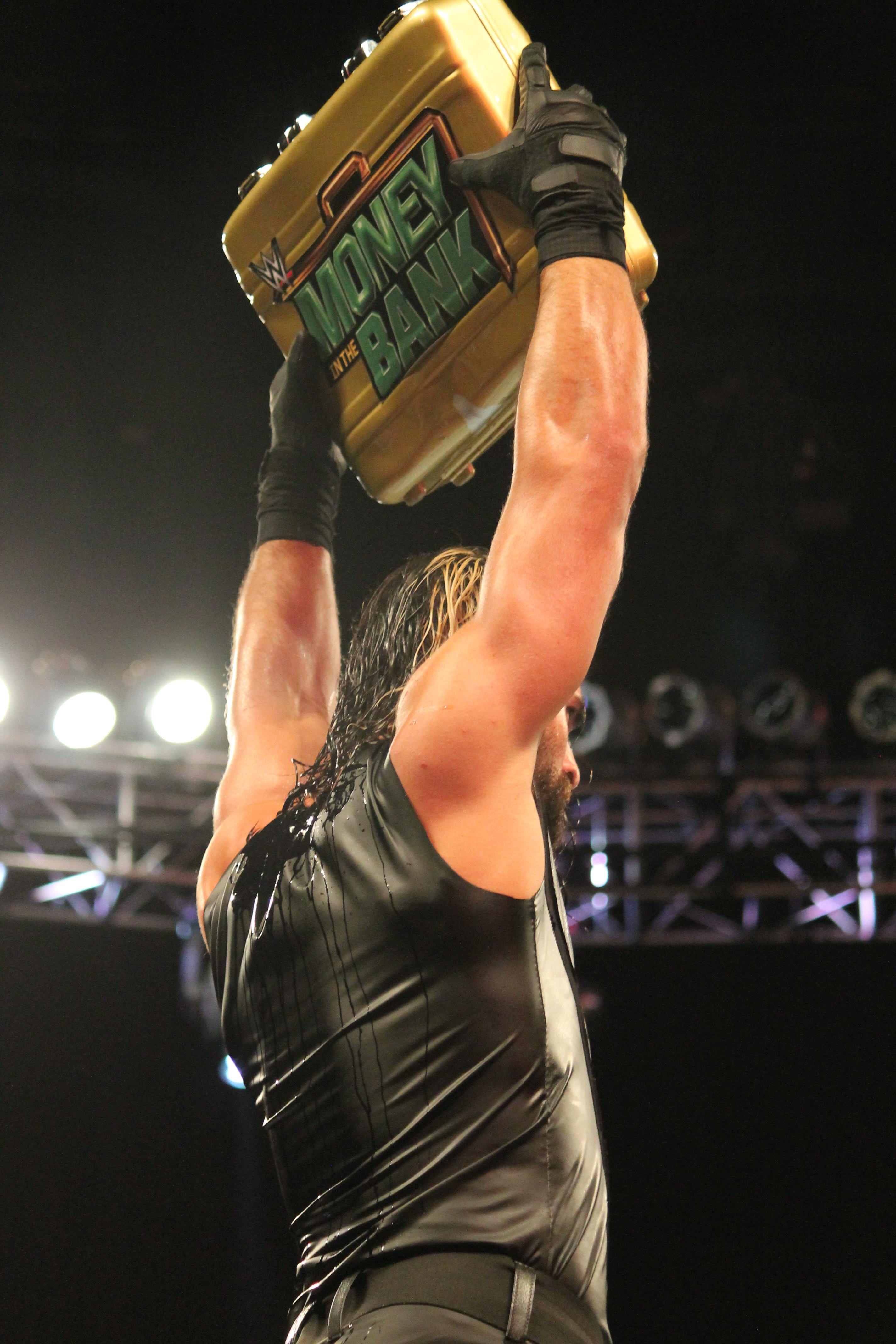 মিস্টার মানি ইন দ্য ব্যাংক সেথ রলিন্স